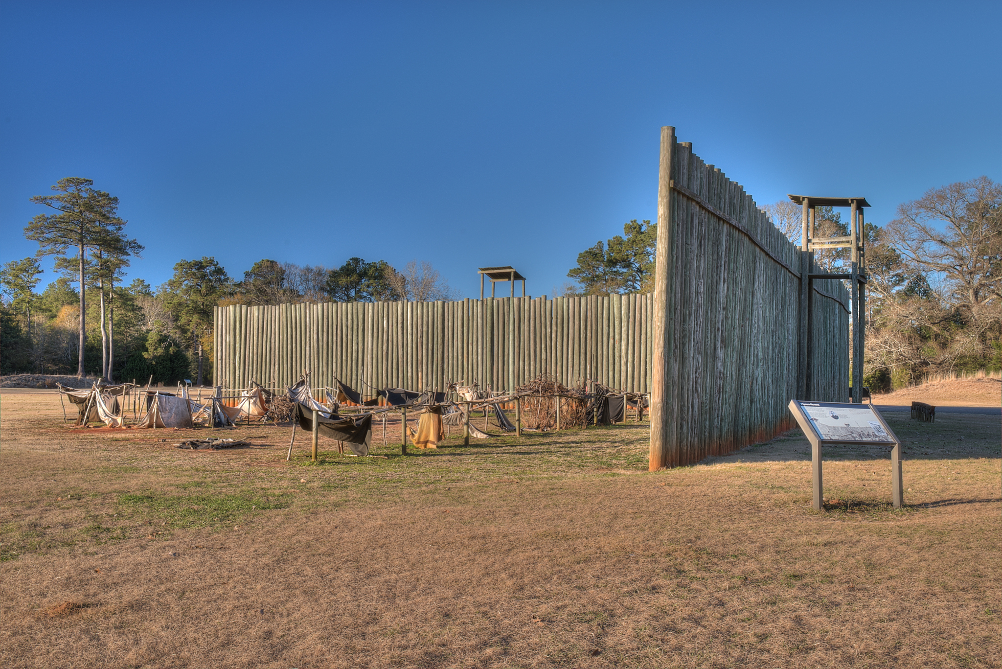 16-01-145: stockade